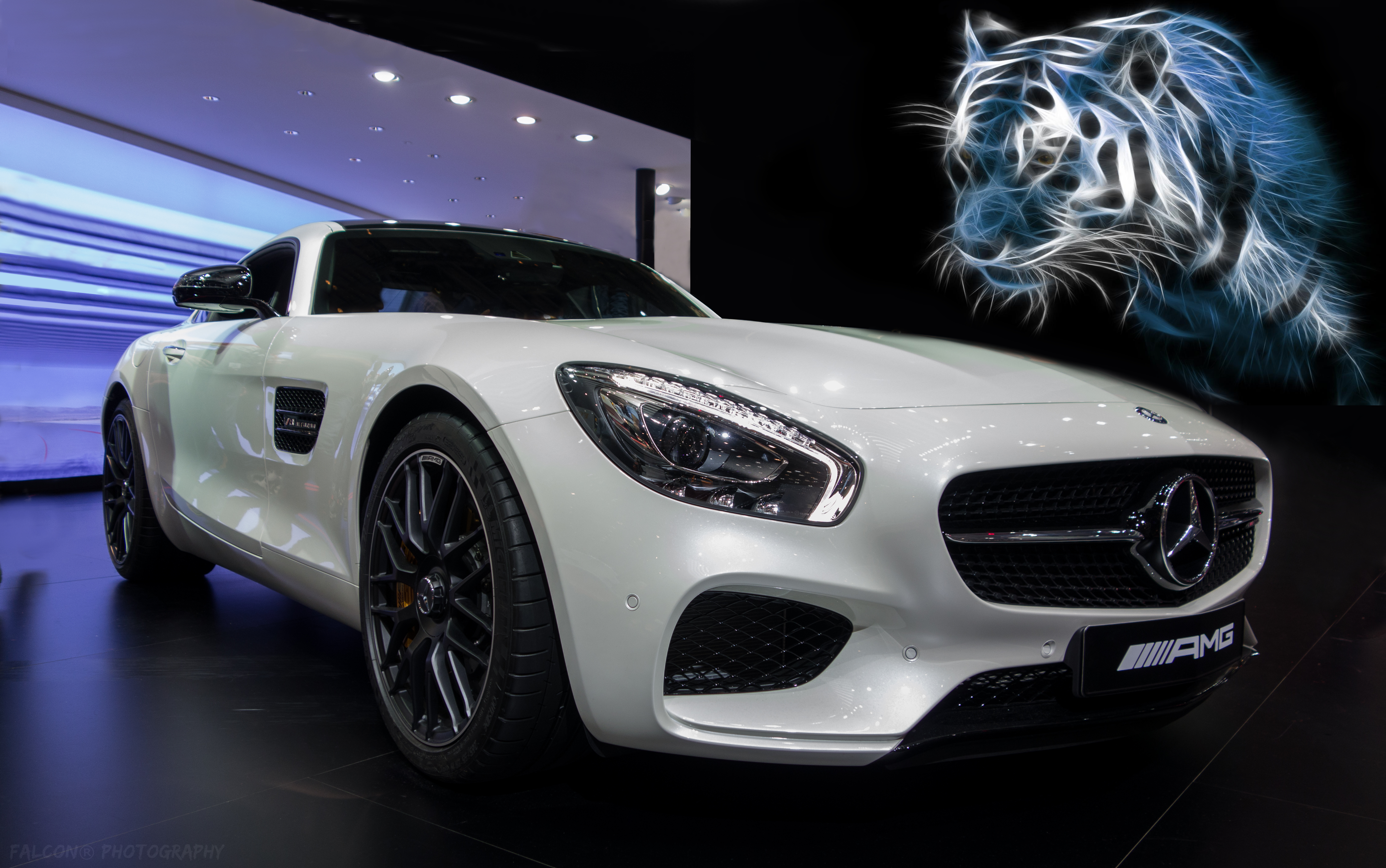 Mercedes-Benz AMG GT 2015